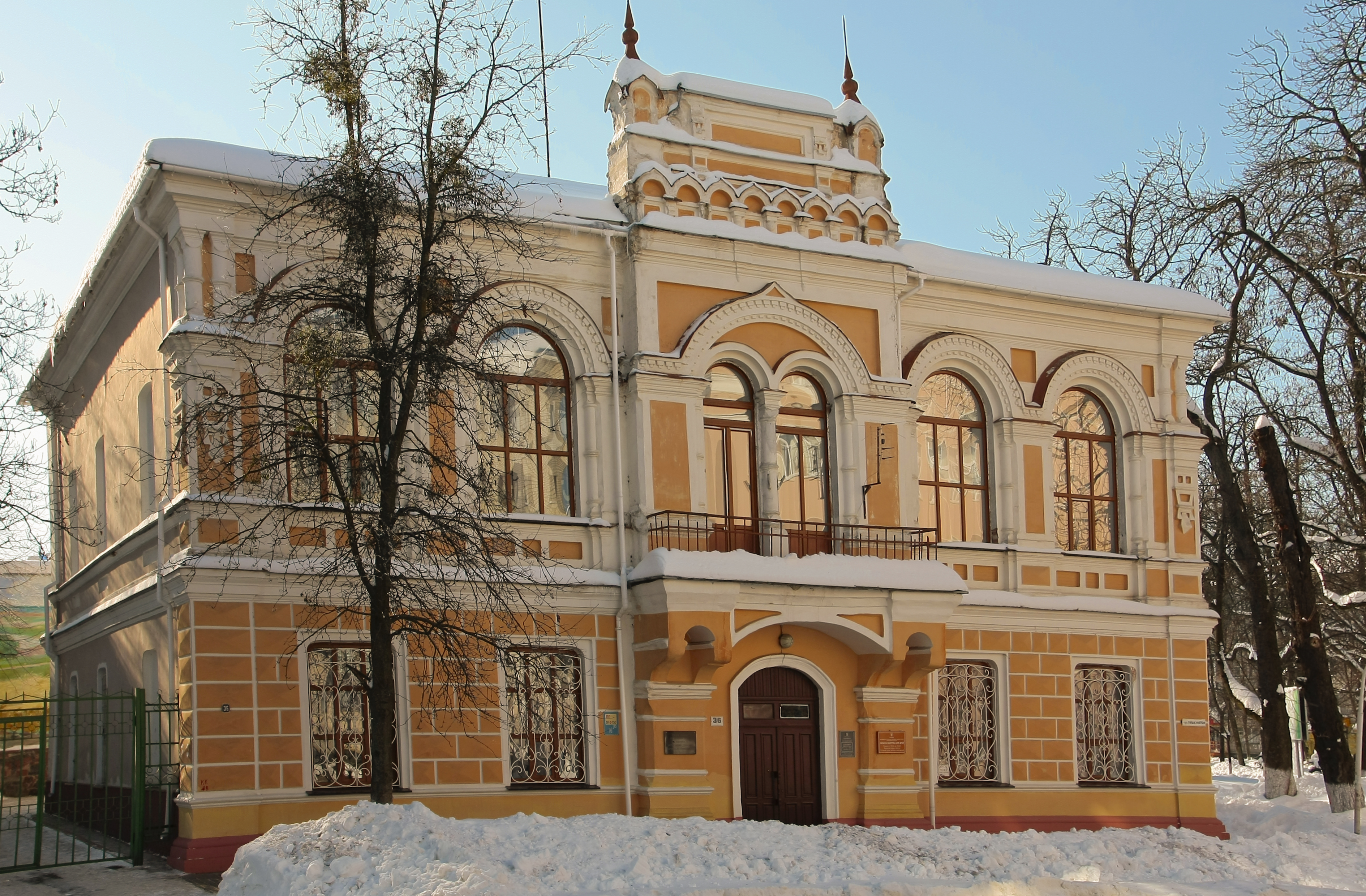 Побудована у 1897році.Розташована у м. Житомирі по вул. Пушкінській, 36. З 1979 року у цій споруді діє Житомирська обласна бібліотека для дітей.